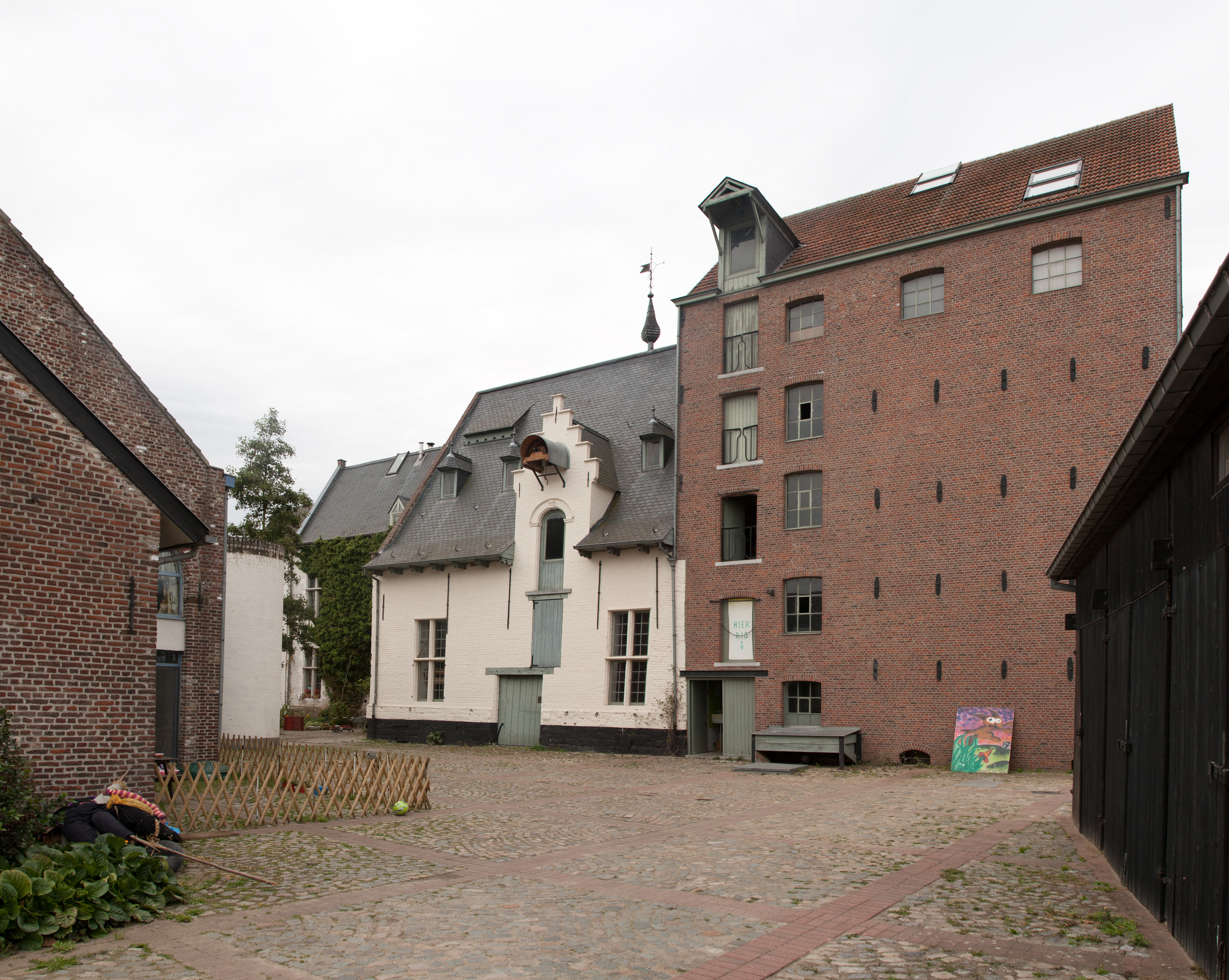 Maalderij Van Dooren, Rotselaar